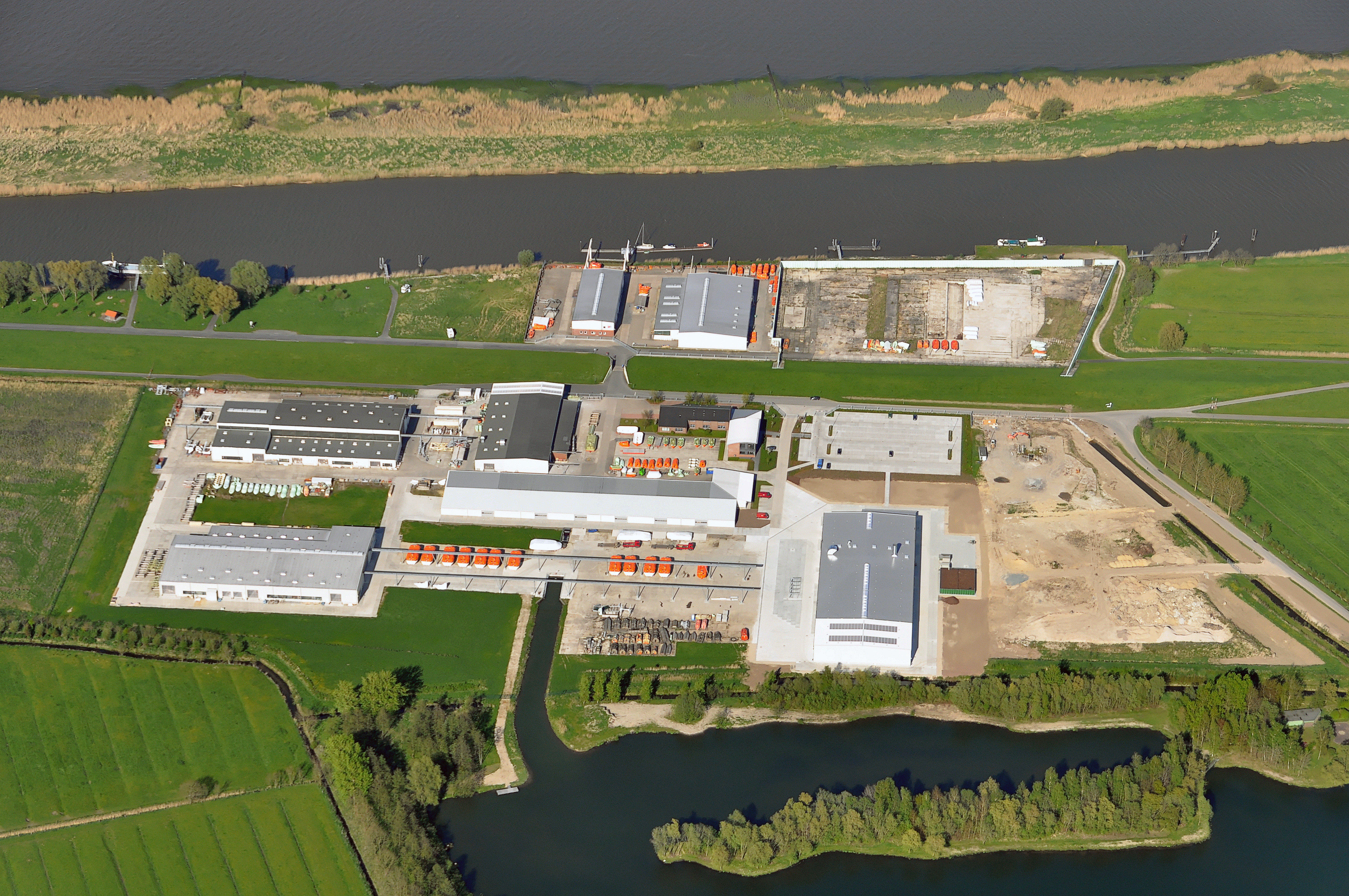 die Hatecke Werft (Robert Hatecke GmbH)